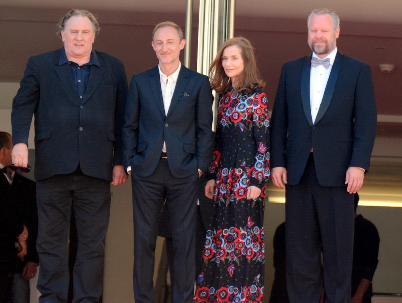 L'équipe de "Valley of love" au festival de Cannes : Gérard Depardieu, Guillaume Nicloux, Isabelle Huppert et Dan Warner